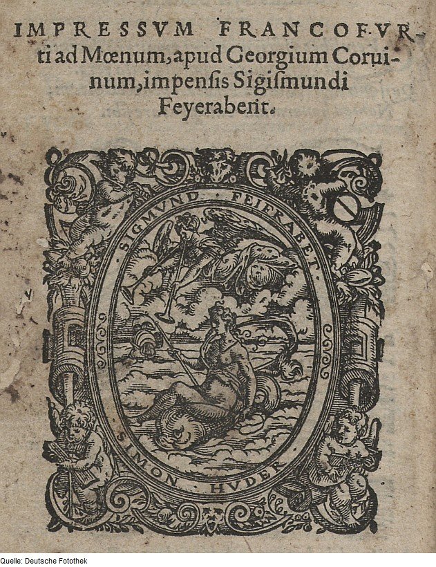 Original image description from the Deutsche Fotothek Druckermarke & Druckerzeichen & Verlegerzeichen & Fama & Amphitrite & Delphin